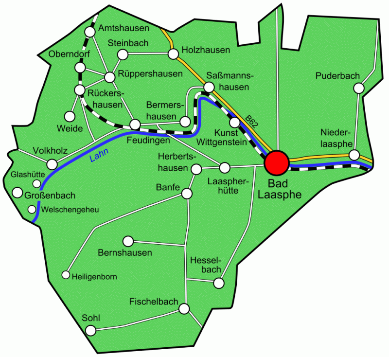 Karte der Kleinstadt Bad Laasphe im Kreis Siegen-Wittgenstein